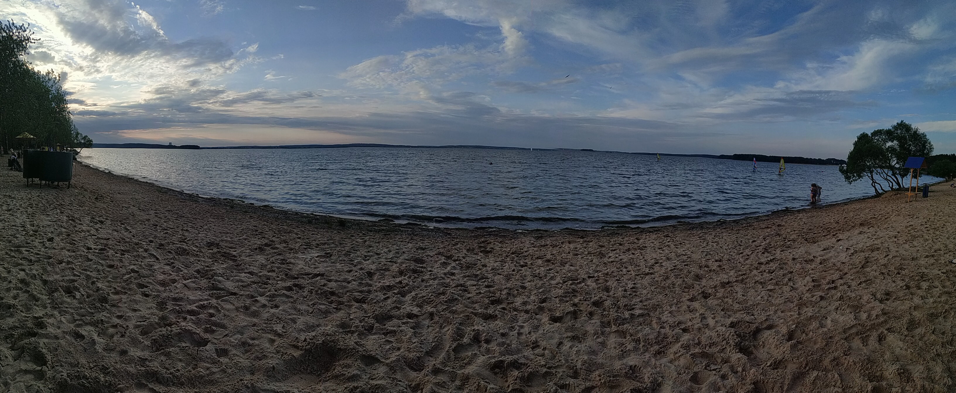 Панорамный вид одного из пляжей Заславского водохранилища (Минского моря)